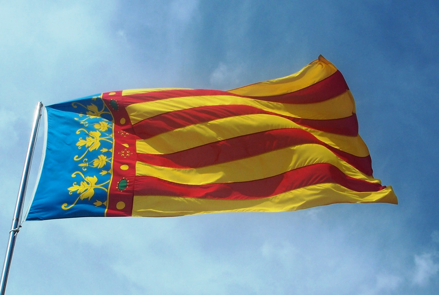 Bandera de la ciutat de València (Senyera Coronada) a les Torres de Serrans